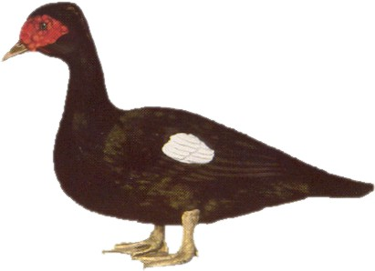 Pato Criollo con el color original del Pato Real, pero con el cuerpo más robusto y pesado.